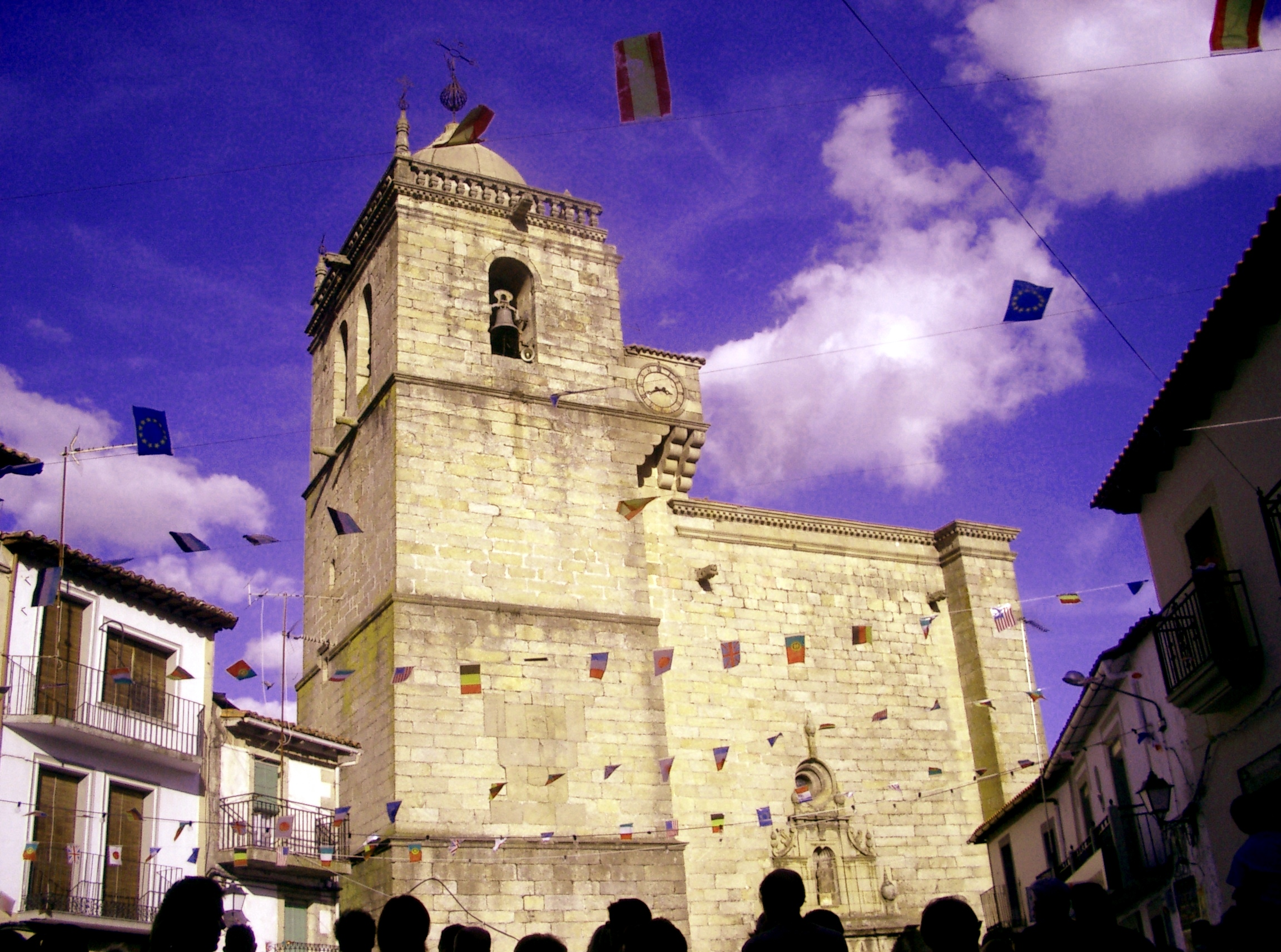 Se encuentra en el centro de el pueblo. Acebo-Caceres (Extremadura).